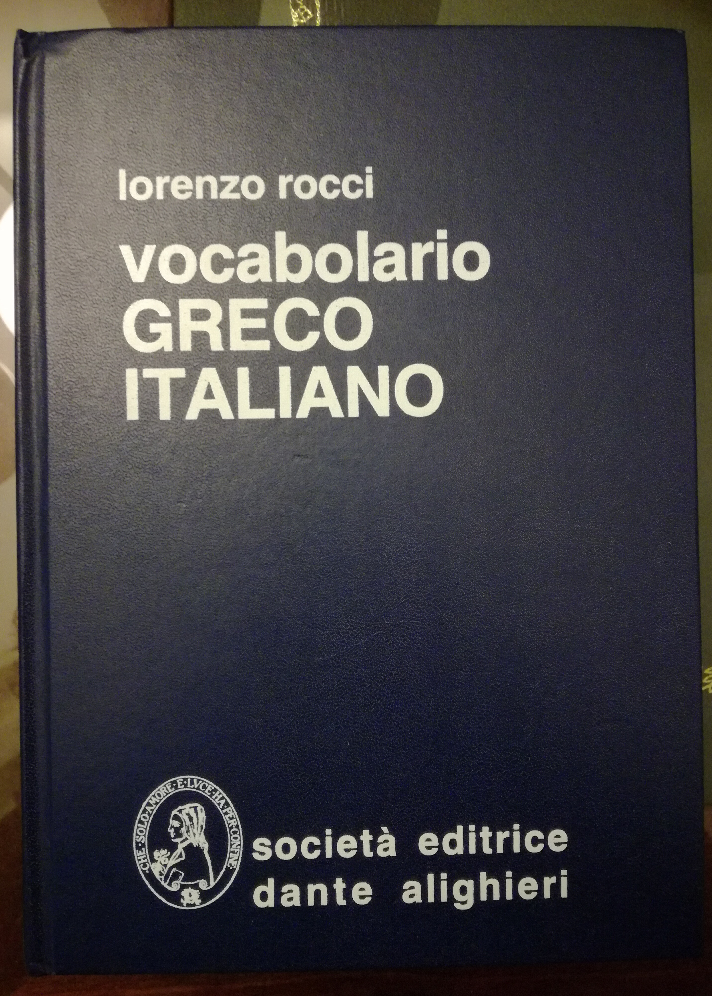 Vocabolario Greco-Italiano, Lorenzo Rocci, 1939 (XL edizione, 2002): copertina